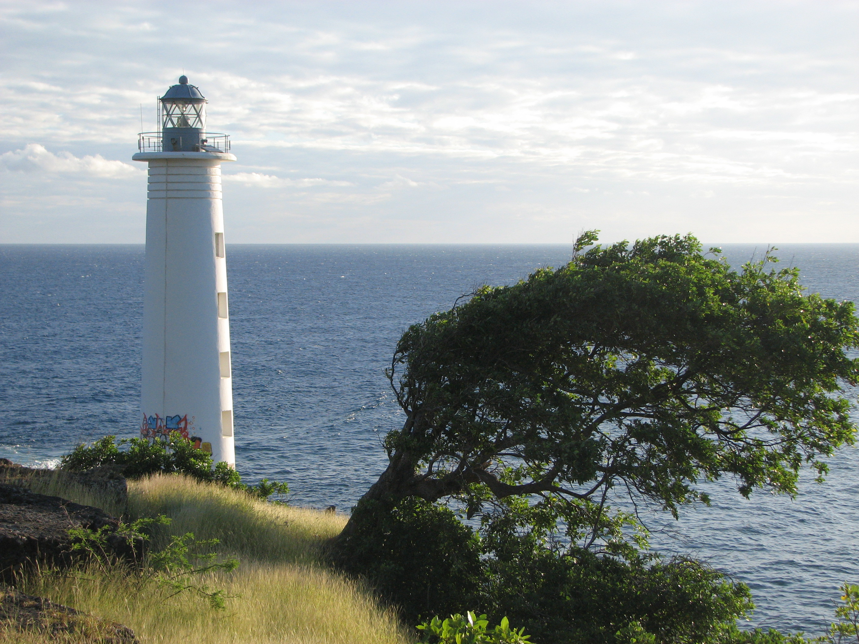 Phare de Vieux-Fort (Guadeloupe)